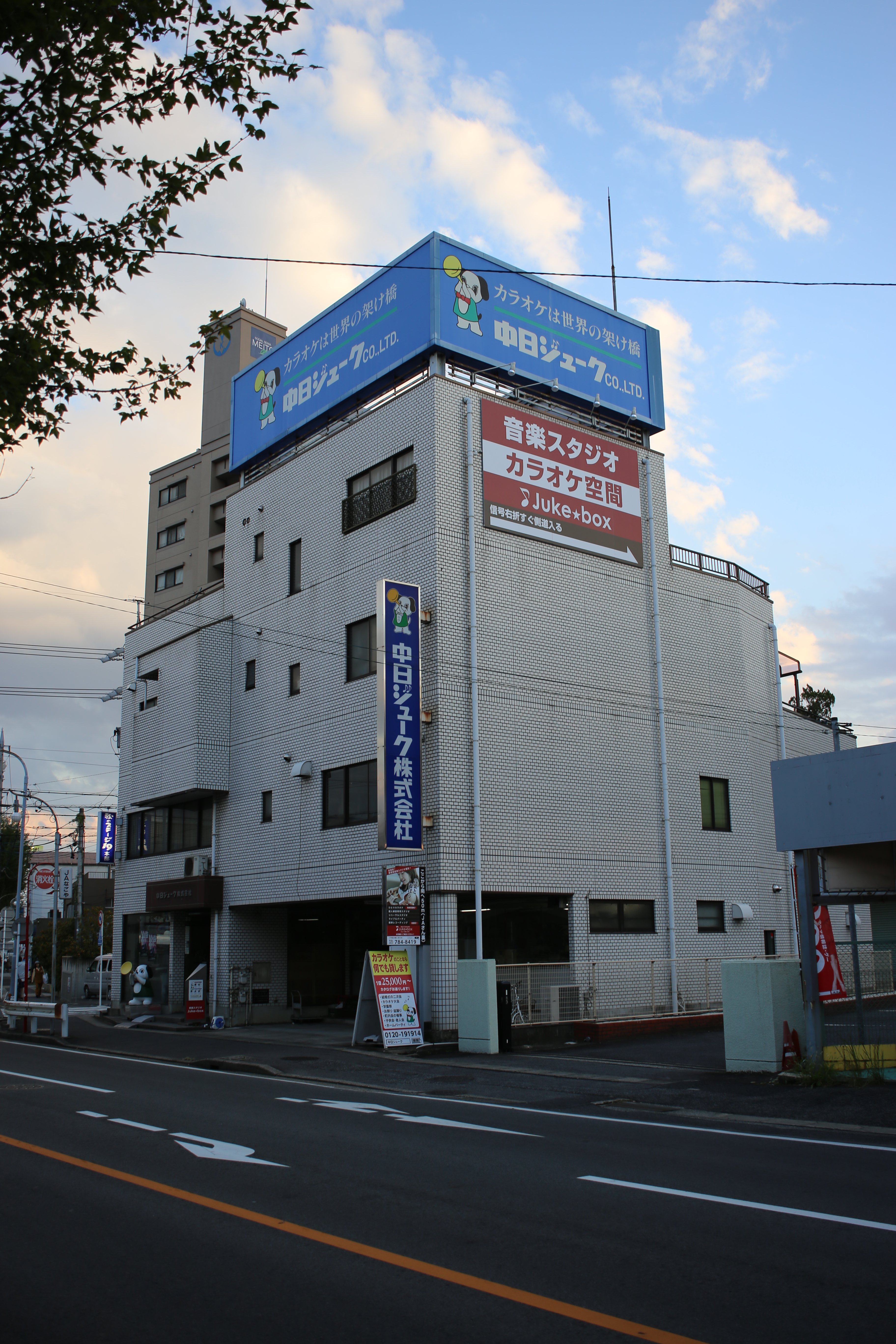 愛知県名古屋市名東区牧の里に所在する中日ジューク本社を北側公道西側より撮影